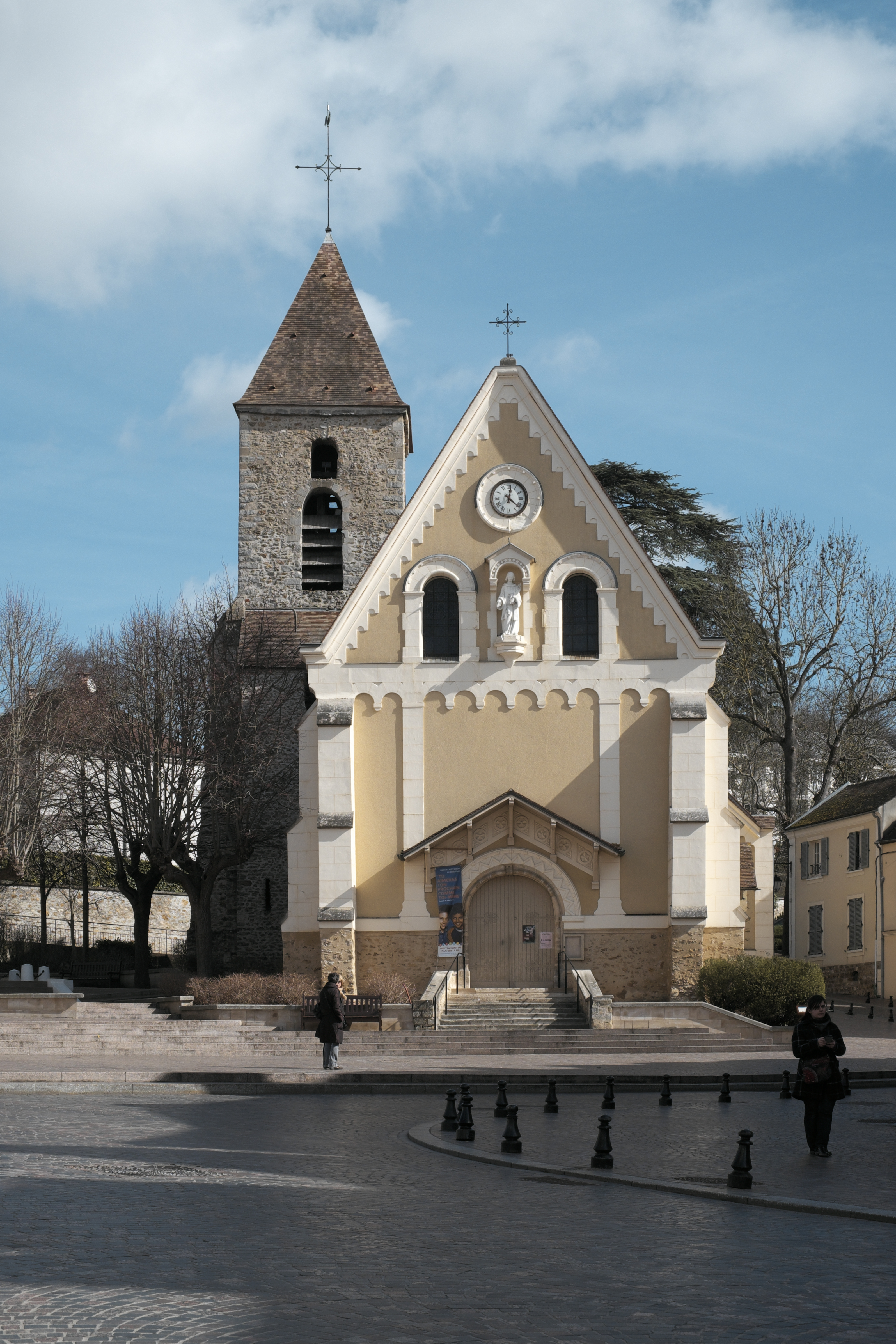 Katholische Pfarrkirche Saint-Honest in Yerres im Département Essonne (Île-de-France/Frankreich)